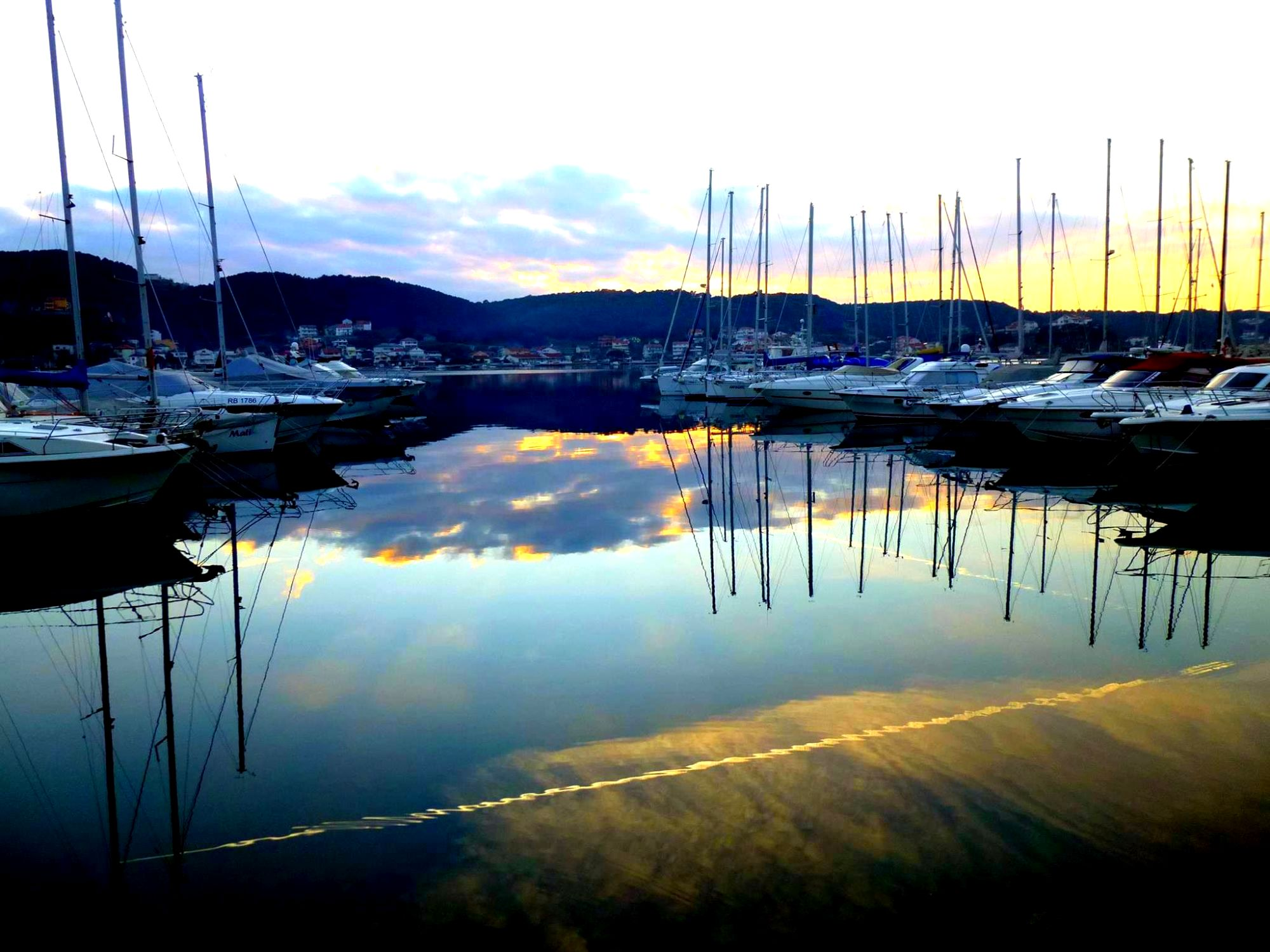 ACI Marina Supetarska Draga, Rab